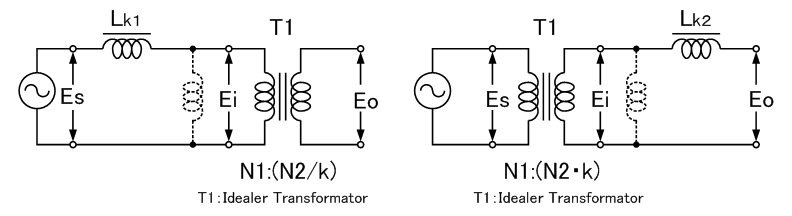 Transformator_eq2